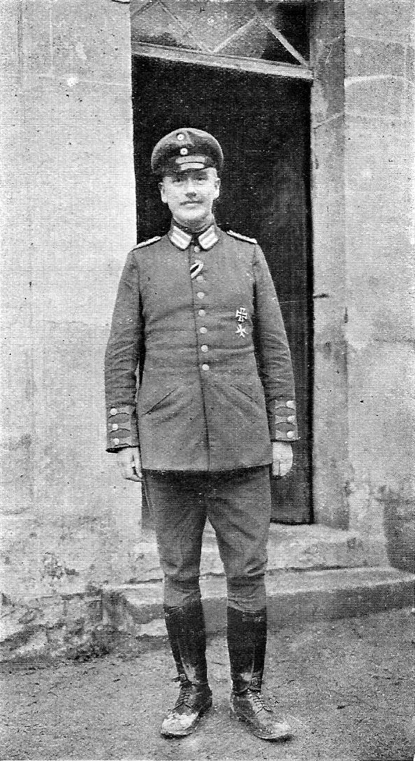 Oberstleutnant Frhr. v. Wangenheim, Kriegs.Kommandeur des Großherzoglich Mecklenburgischen Grenadier-Regiments Nr. 89